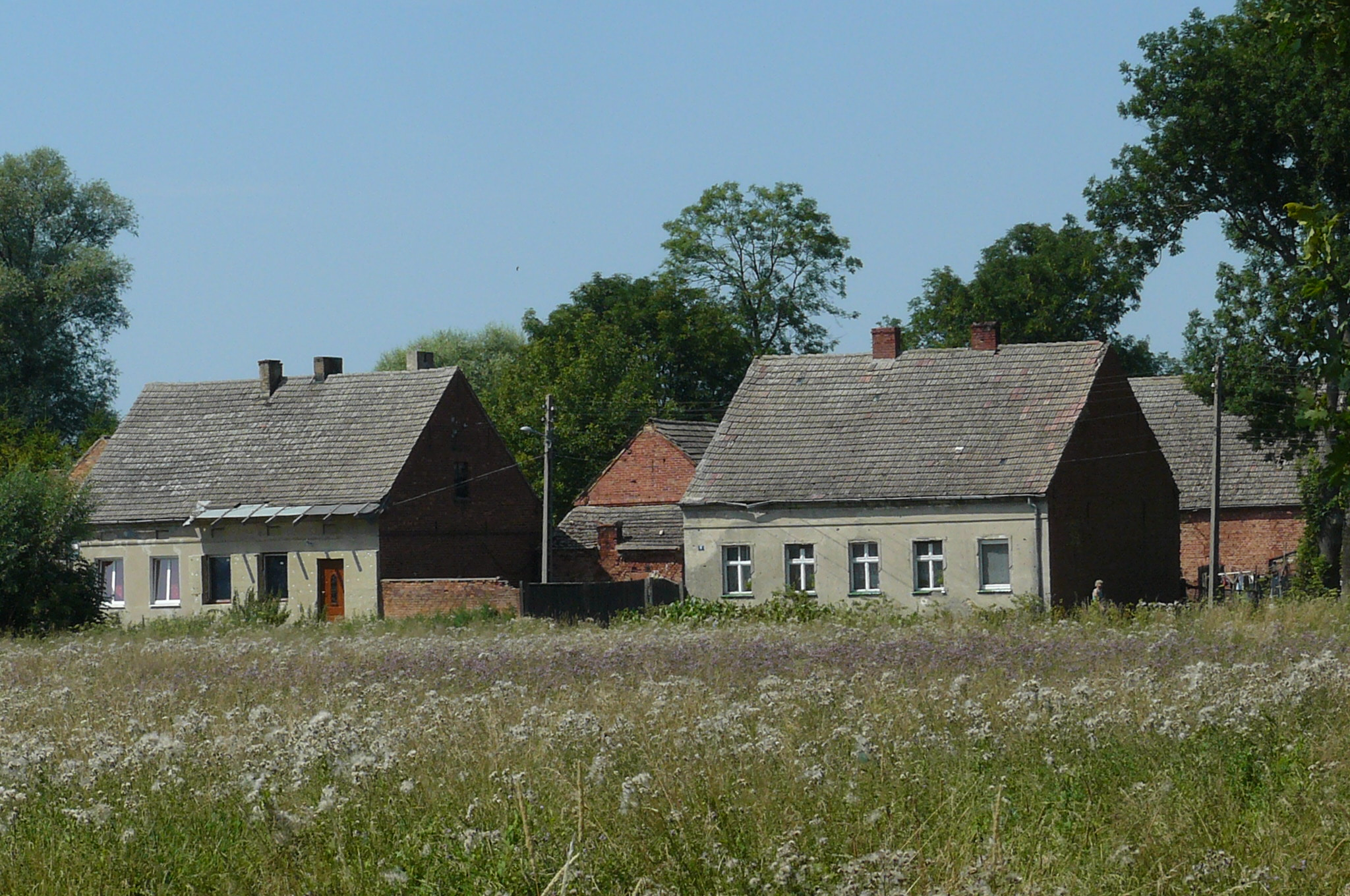 Giżyn koło Pyrzyc.